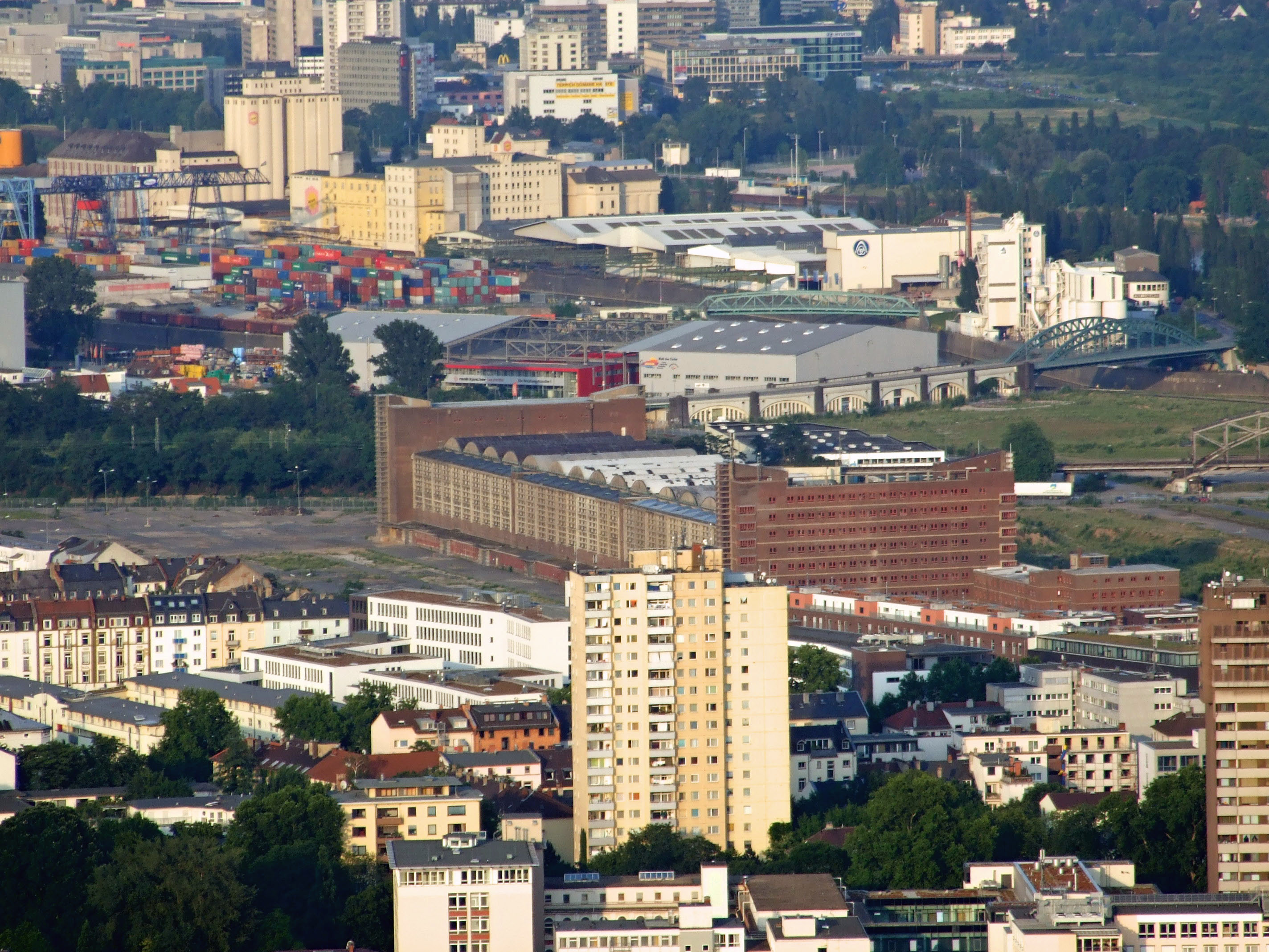 Grossmarkthalle vor Osthafengelände mit Schmick- und Honsellbruecke